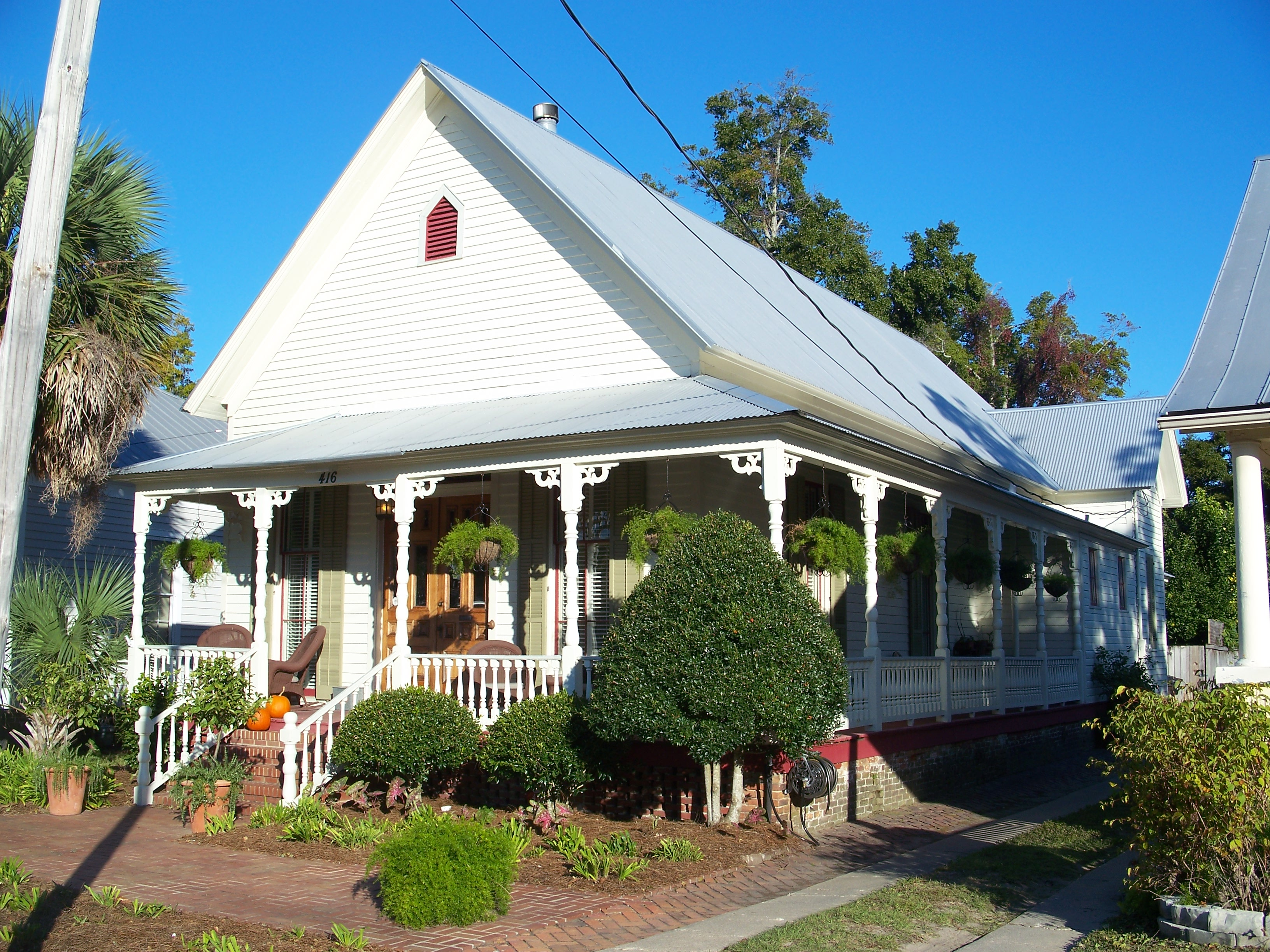 Pensacola, Florida: St. Michael's Creole Benevolent Association Hall.